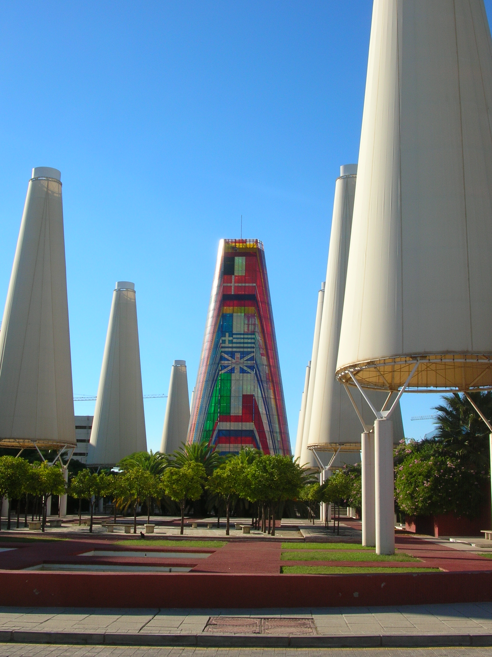 L'Avenue de l'Europe de l'Expo'92 à Séville, photographiée en 2007Architectes: Nicolas Normier et Jean Marie Hennin